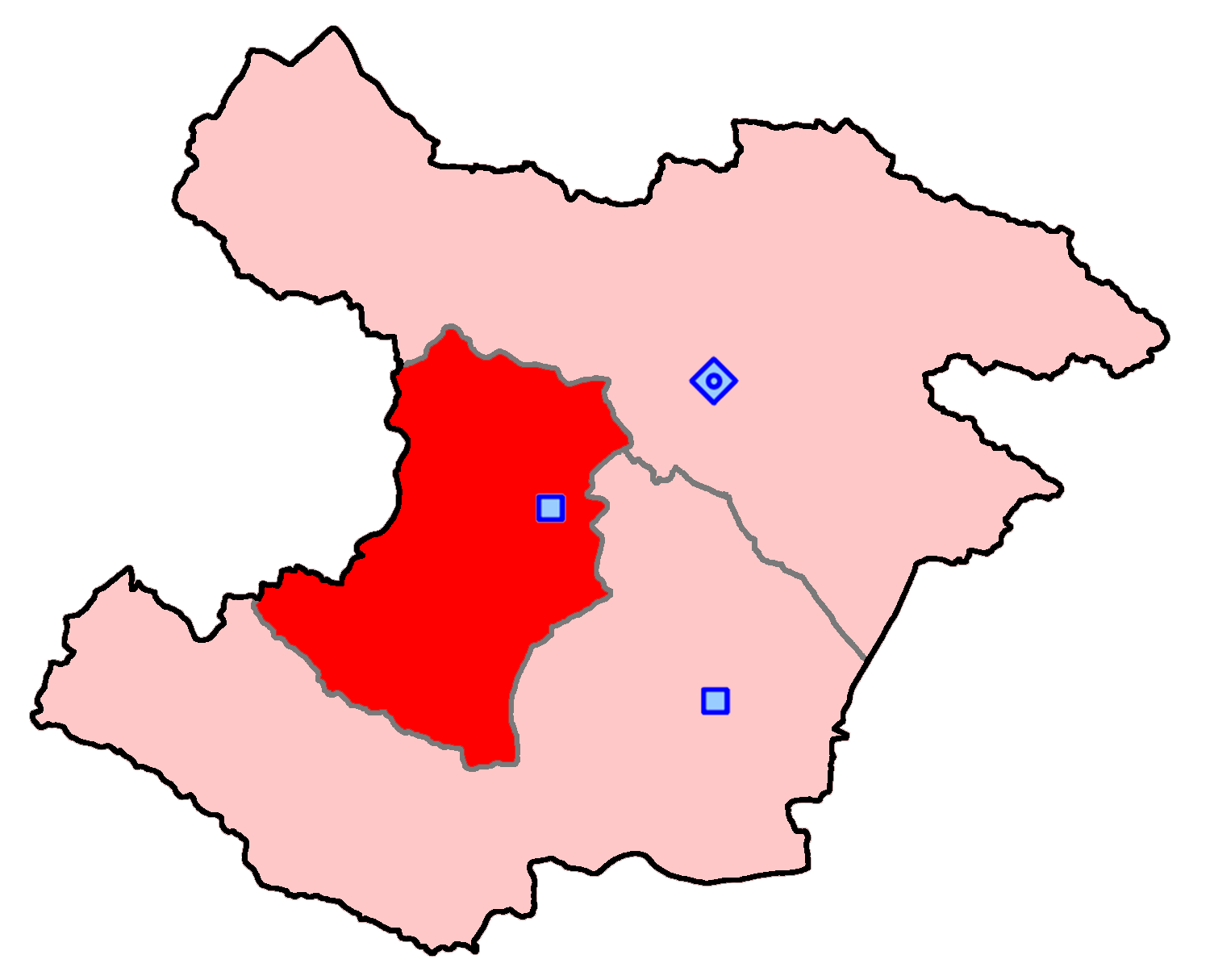 حوزهٔ انتخاباتی تاکستان برای انتخابات مجلس شورای اسلامی